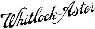 Logo der Whitlock Automobile Co. Ltd.